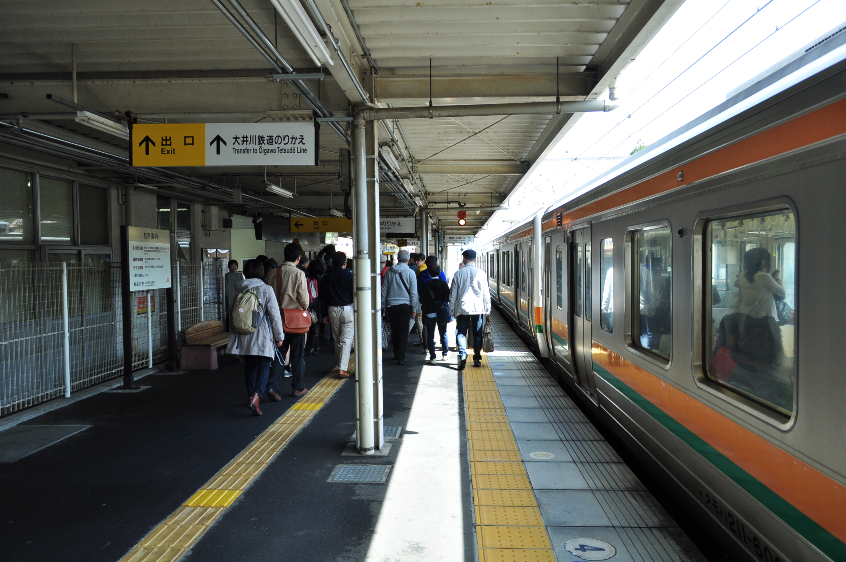 （2015年4月4日撮影）